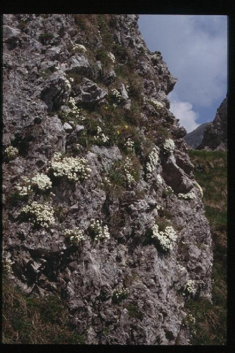 Saxifarga tombeanensis: ambiente di crescita